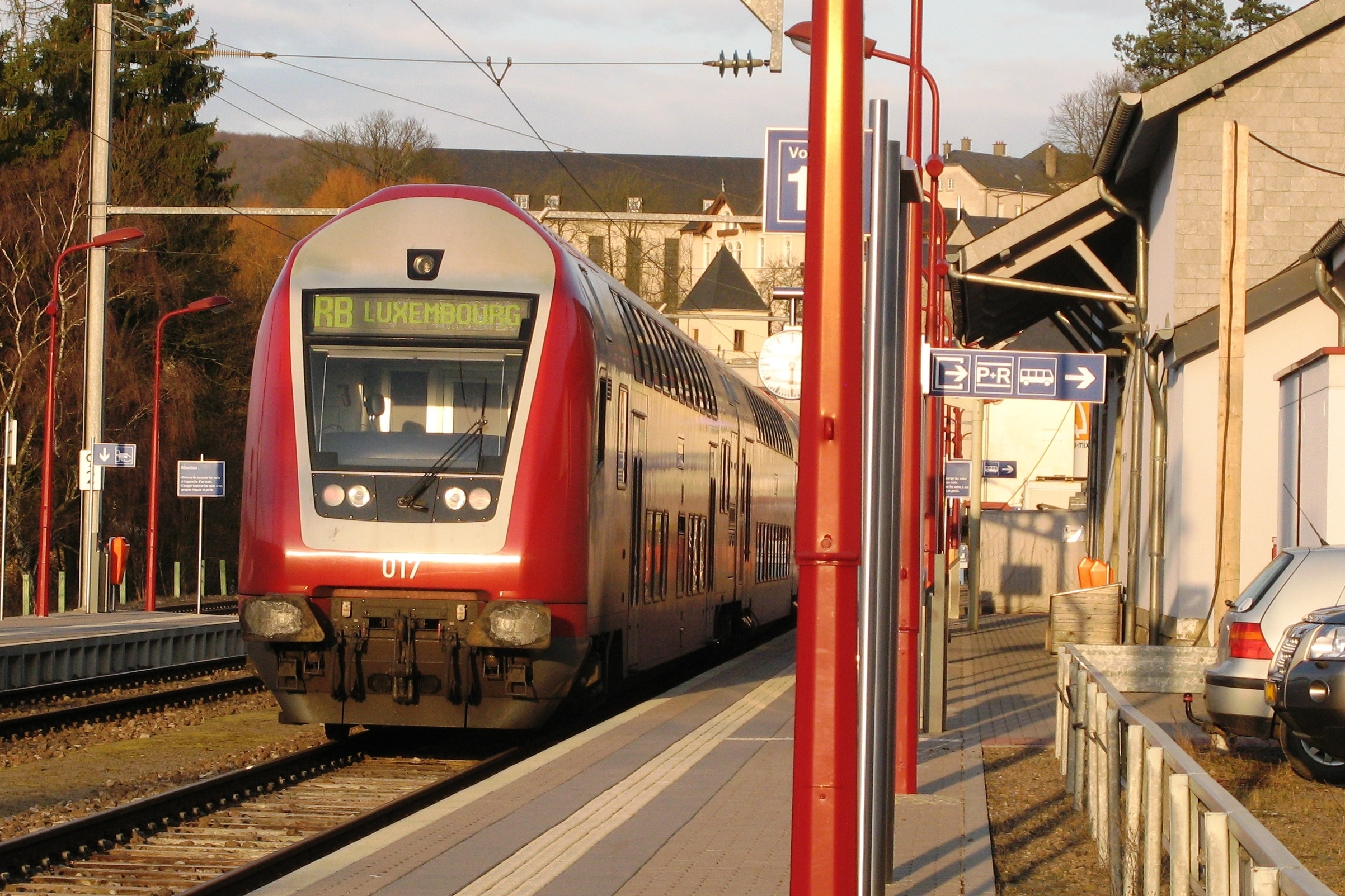 Den CFL Dosto 017 an der Gare zu Wolz.